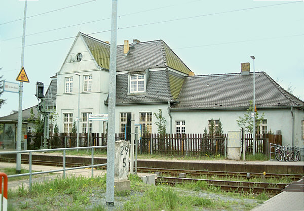 Sachsenhausen bei Oranienburg Bahnhof